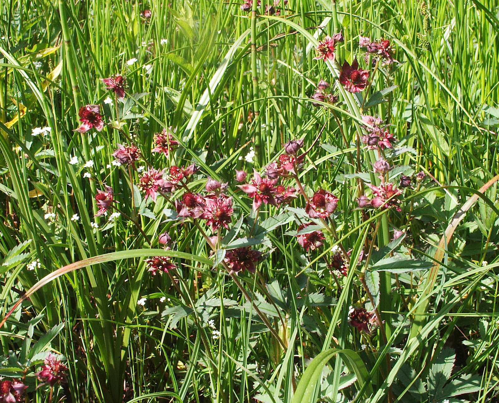 Comarum palustre (syn. Potentilla palustris), Virngrund, Germany